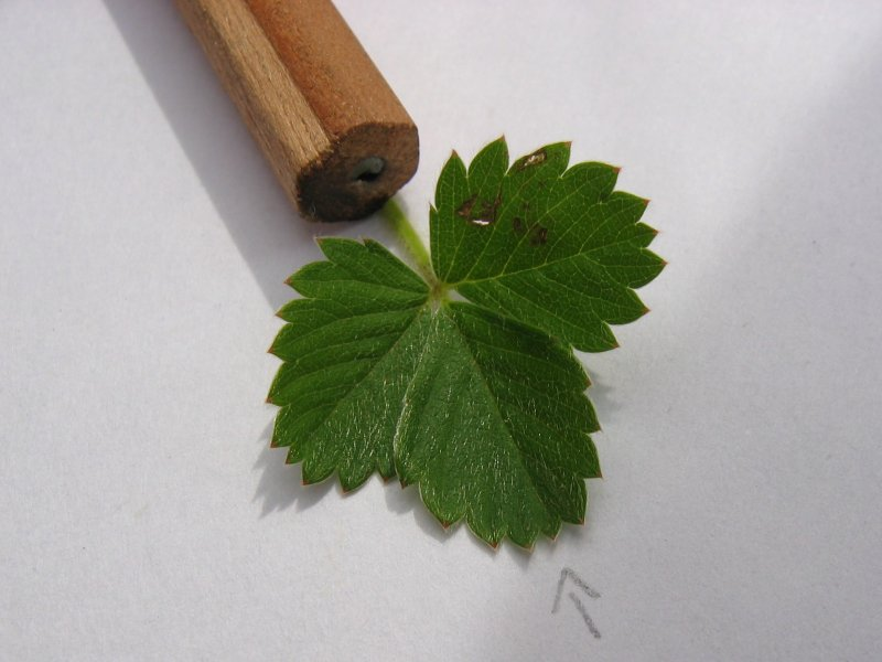 Hügel-Erdbeere Fragaria viridis, Rügen